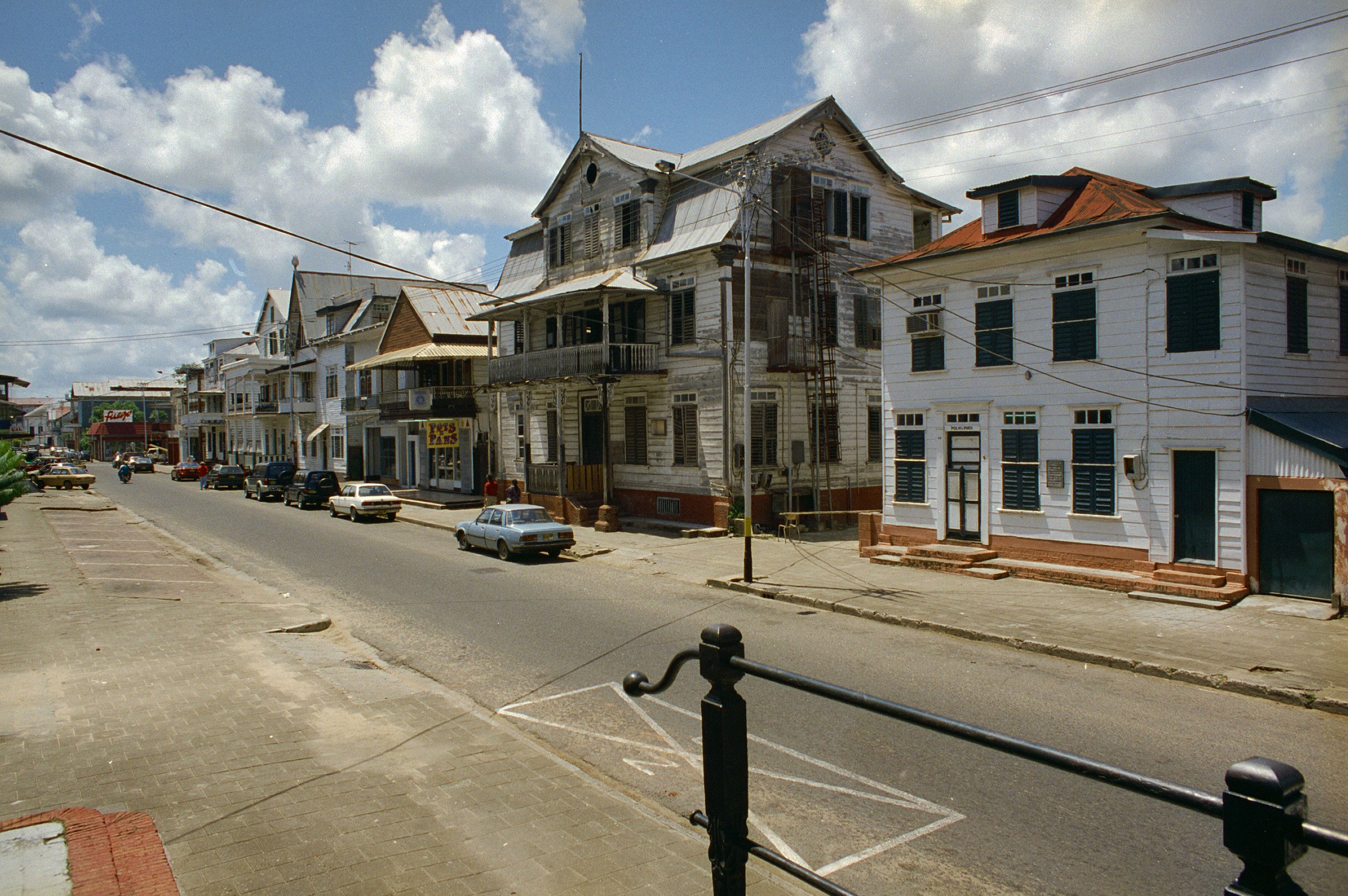 Koloniale geschiedenis: Overzicht van de voorgevels, van rechts naar links (opmerking: Suriname Reis Loek Tangel)